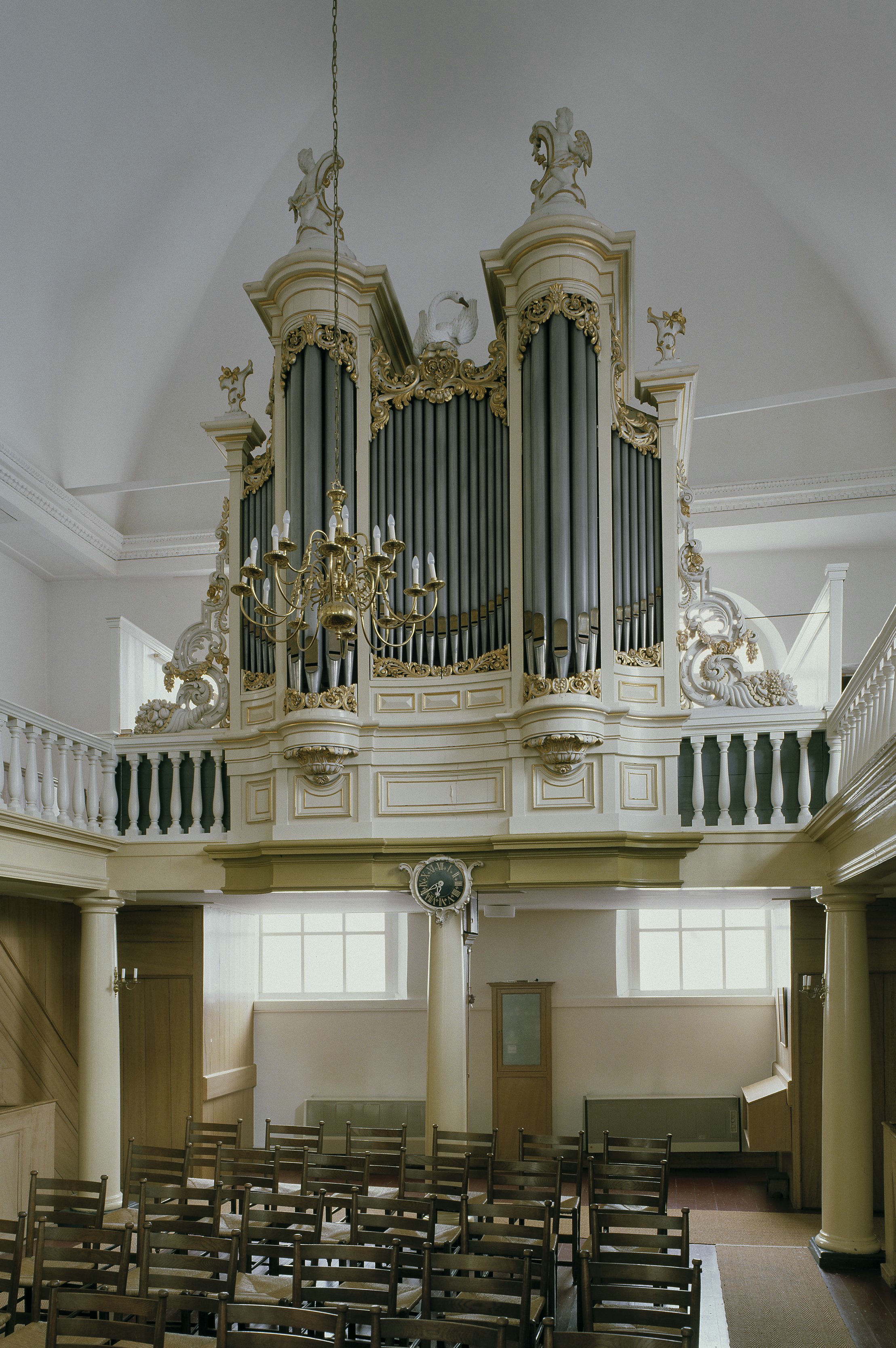 Evangelisch Lutherse kerk: Interieur, aanzicht orgel, orgelnummer 845 (opmerking: Gefotografeerd voor Het Historische Orgel in Nederland 1865-1872)